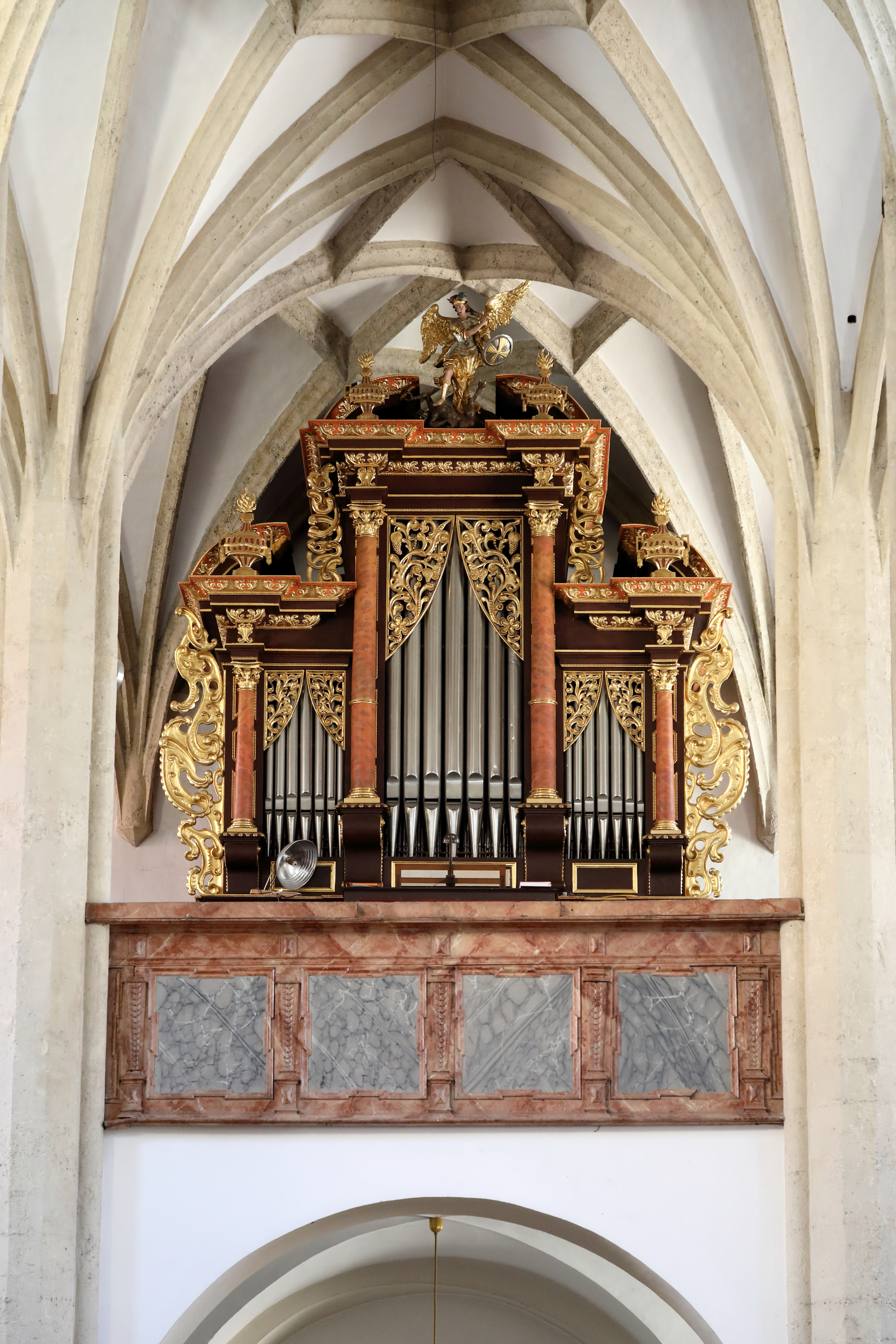 Orgel der röm.-kath. Pfarrkirche hl. Nikolaus in der steirischen Stadtgemeinde Rottenmann.Die Orgel war das letzte Werk von Franz Xaver Chrismann, wobei sie nach seinem Tod 1795 von seinem Gesellen und Nachfolger Peter Hölzl fertiggestellt wurde. 1901 erweiterte Matthäus Mauracher II. die ursprünglich 7-registrige Orgel auf 17 Register, wobei die Pfeifen auch etwa verdoppelt auf 1131 wurden. Im Jahr 1968 erfolgte unter dem Orgelbaumeister Krenn aus Graz ein „Rückbau“ auf „Chrismann-Klang“ statt.